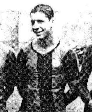 Bebel García García.jpg